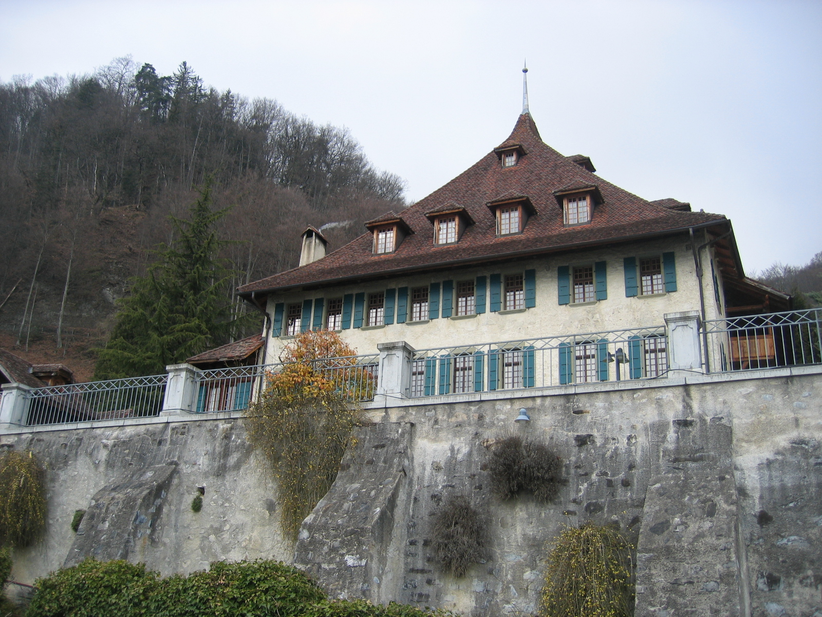 Zeigt das Gut Ralligen im Berner Oberland